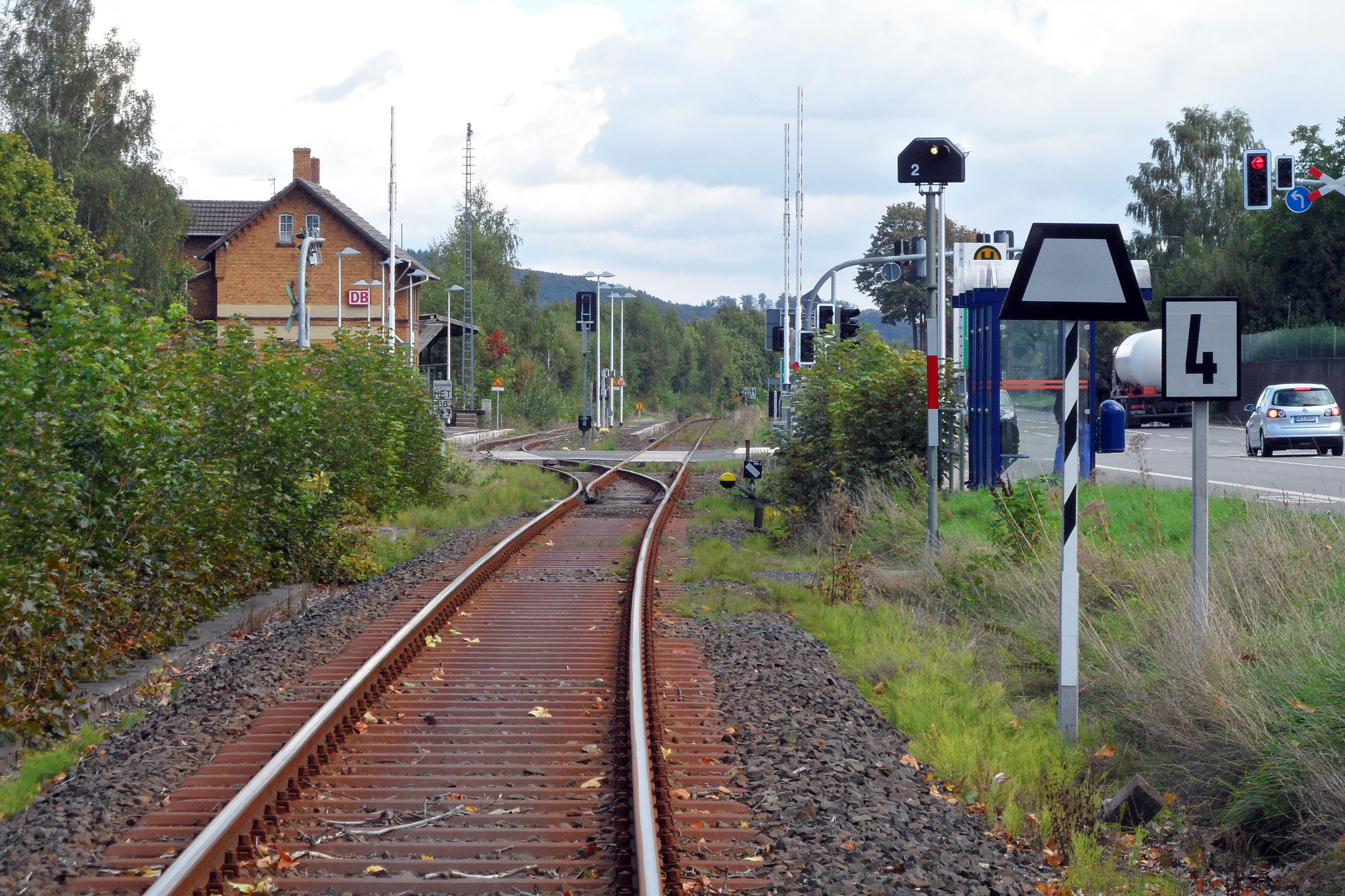 Strecke 3941 Wabern (Bz Kassel)–Bad Wildungen, mit vereinfachtem Nebenbahndienst. Die Trapeztafel ersetzt das Einfahrsignal, mit dem Lf 7 wird die Geschwindigkeit im Bahnhof auf 40km/h begrenzt, das kennlichtzeigende Signal 2 dient der Überwachung der Rückfallweiche.